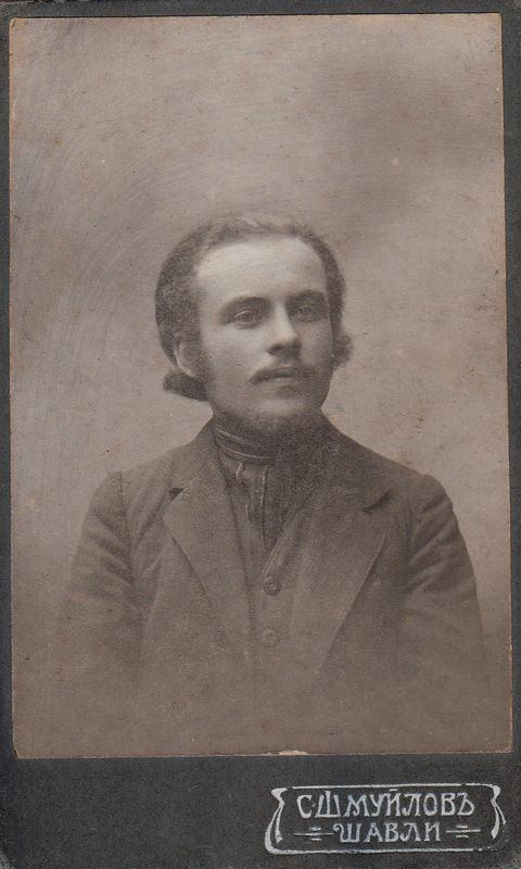 Vladas Rekašius (slapyvardis Smidro Šakelė, 1893 m. gegužės 15 d. Vijoliškio dvare, Biržų rajonas – 1920 m. kovo 13 d. Plungėje) – poetas, žurnalistas, vertėjas.